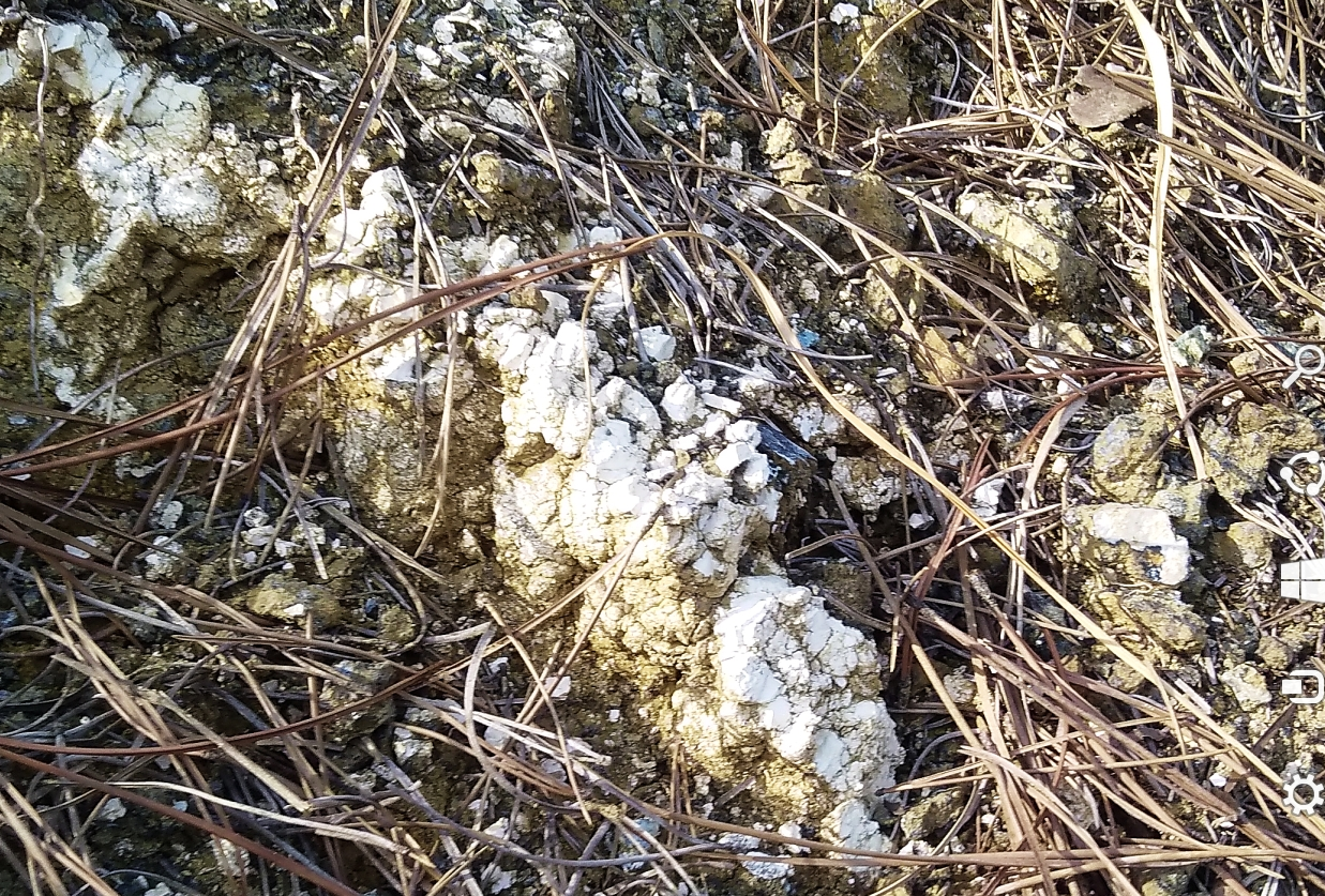 Monte Baron (Alpi Graie): affioramento di uno straterello di magnesite in una delle ex-cave